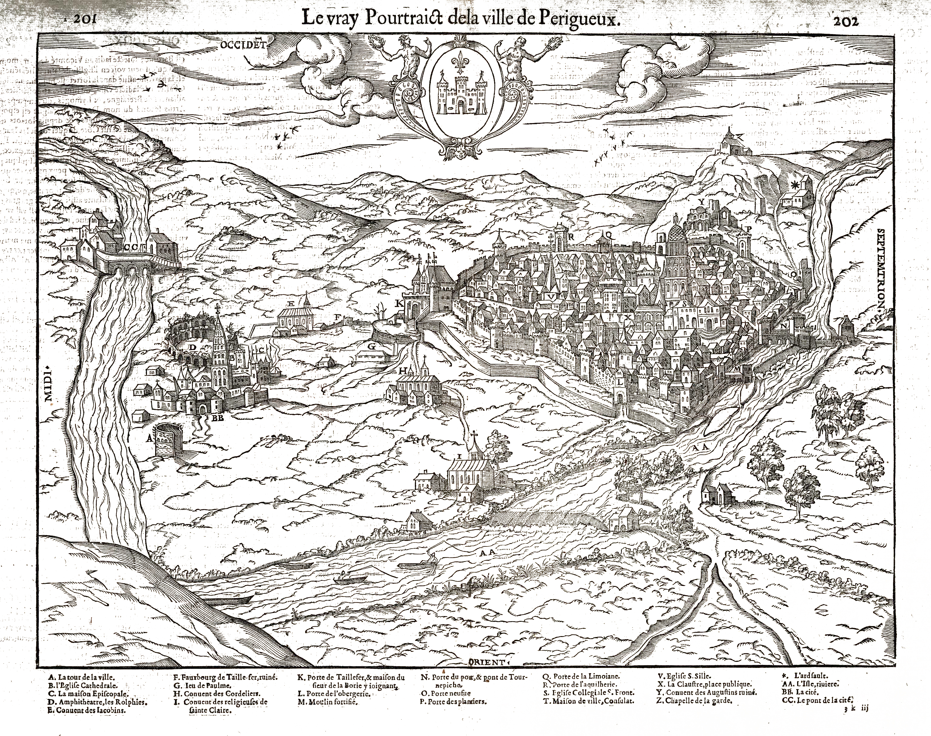 Premier plan de la ville de Périgueux